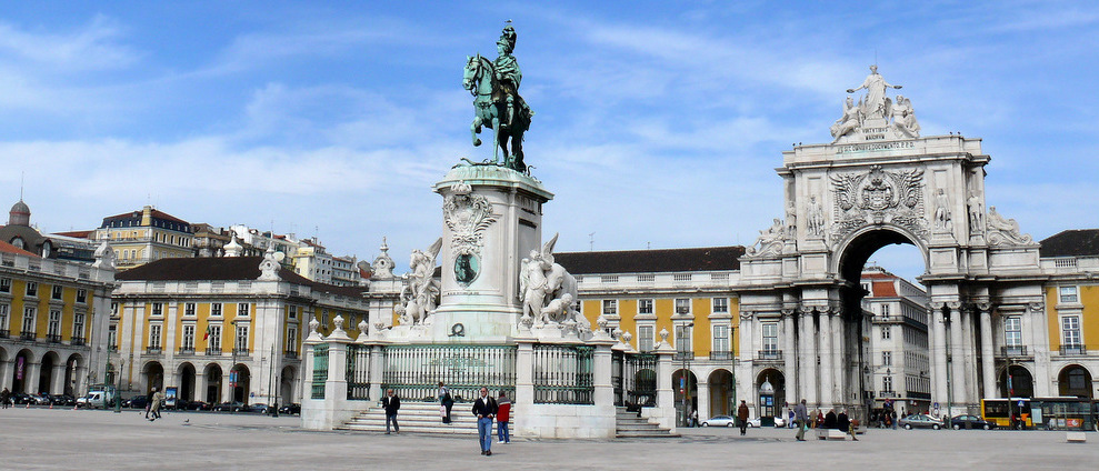 Praça do Comercio